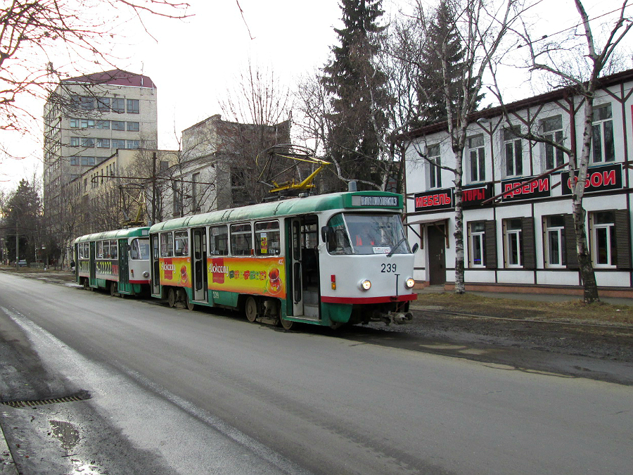 г.Владикавказский трамвай.